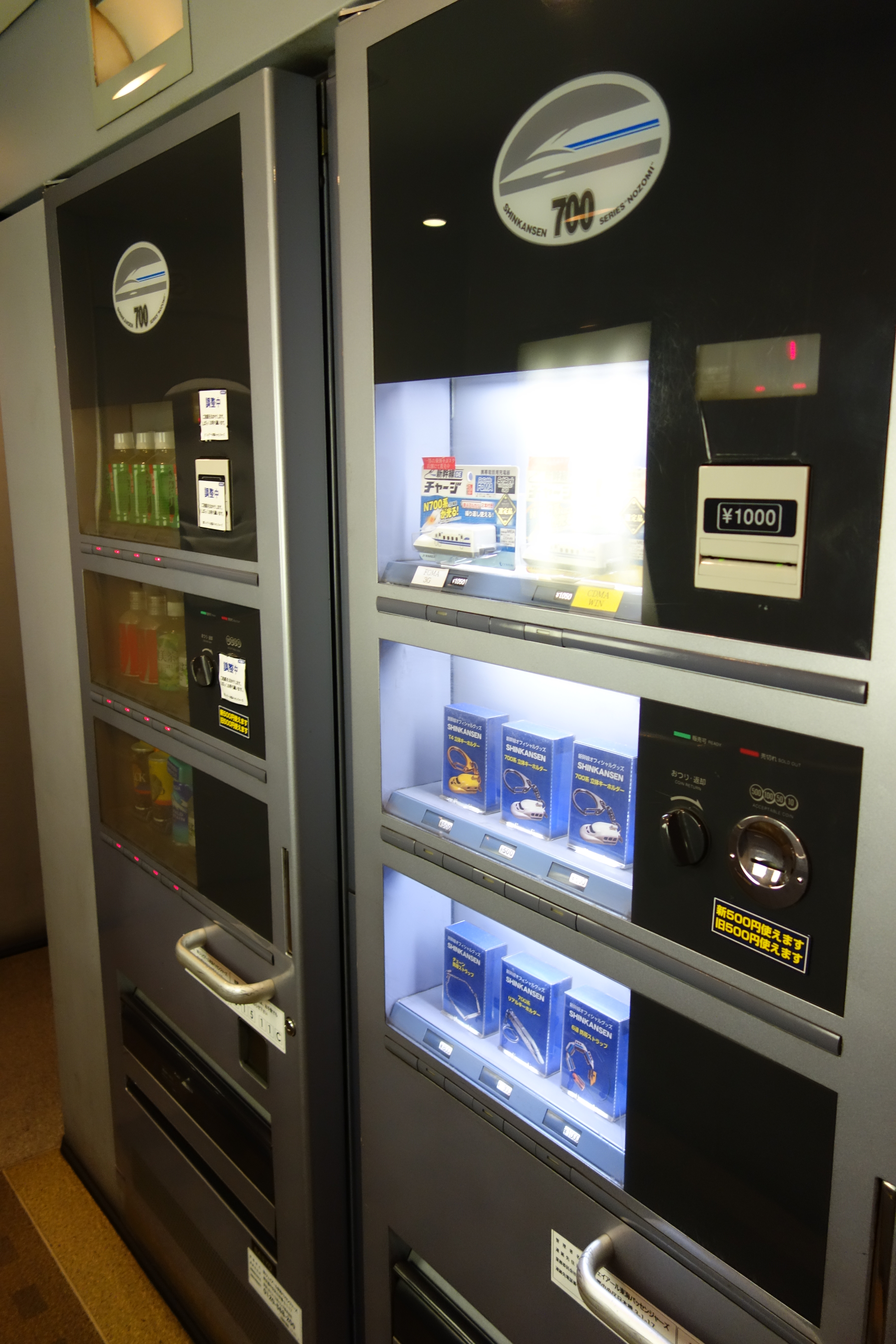 700系C編成の自動販売機 （11号車、C15編成）